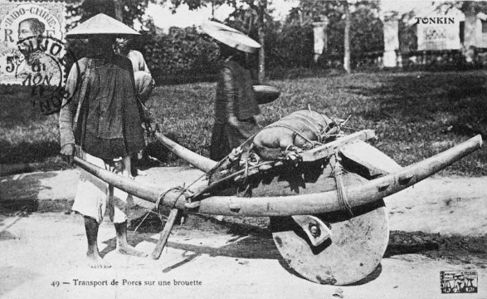 Description : Brouette servant pour le transport des porcs au Tonkin Statut